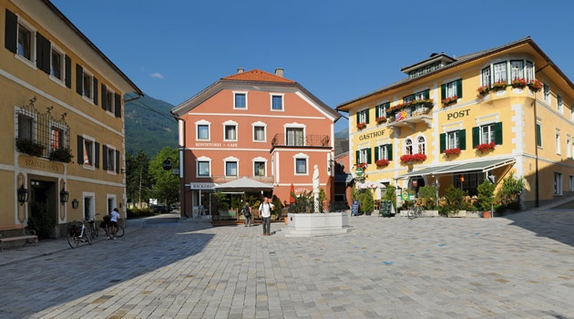 Oberdrauburg, Gasthof Post; gegenüber das Stainern-Haus